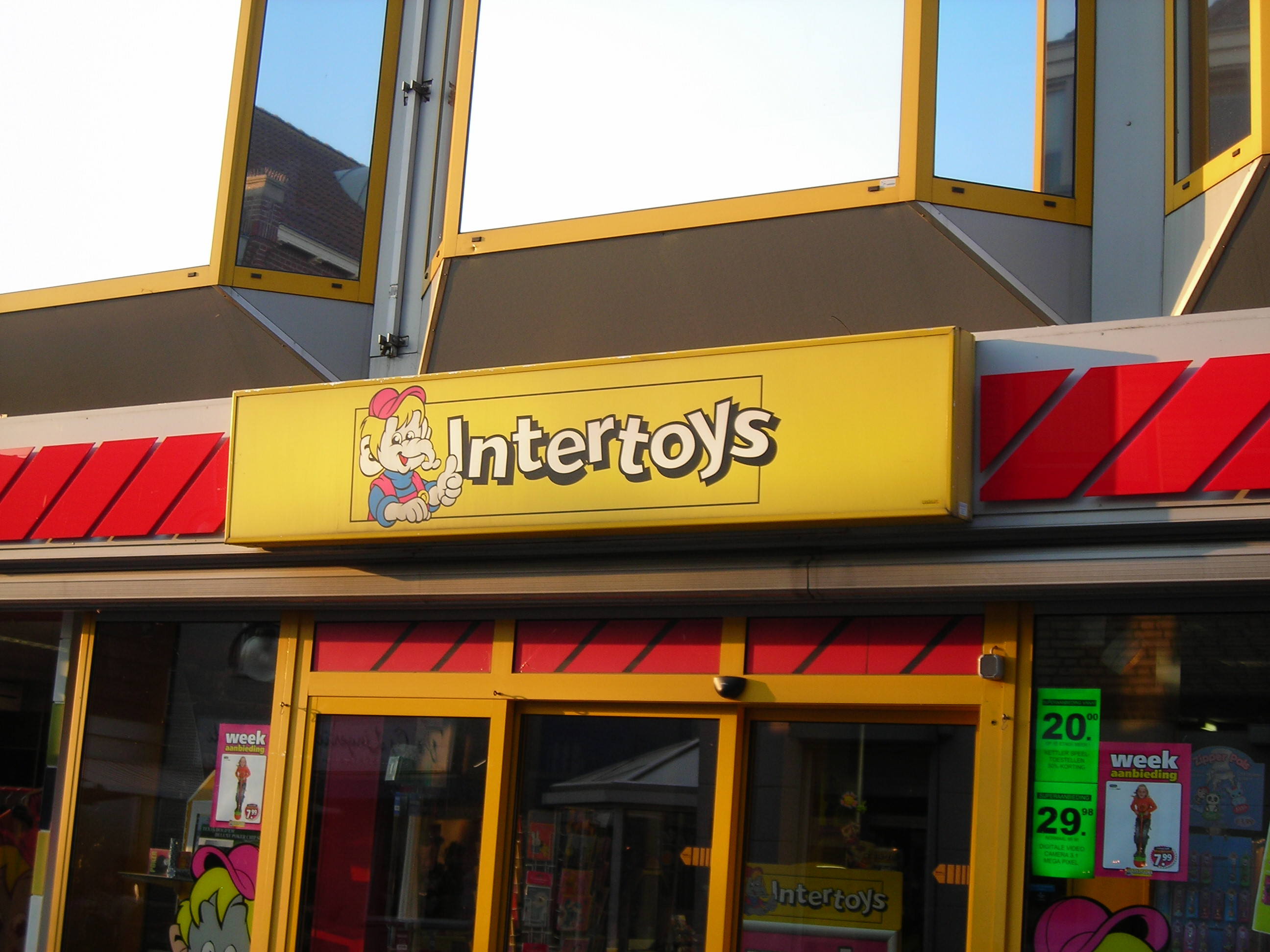 An Intertoys shop in Boxmeer